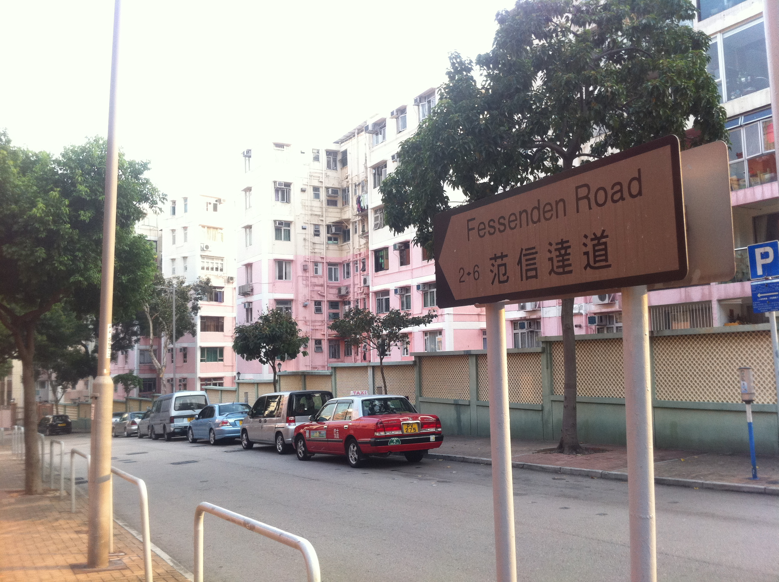 中文（香港）: 九龍塘范信達道